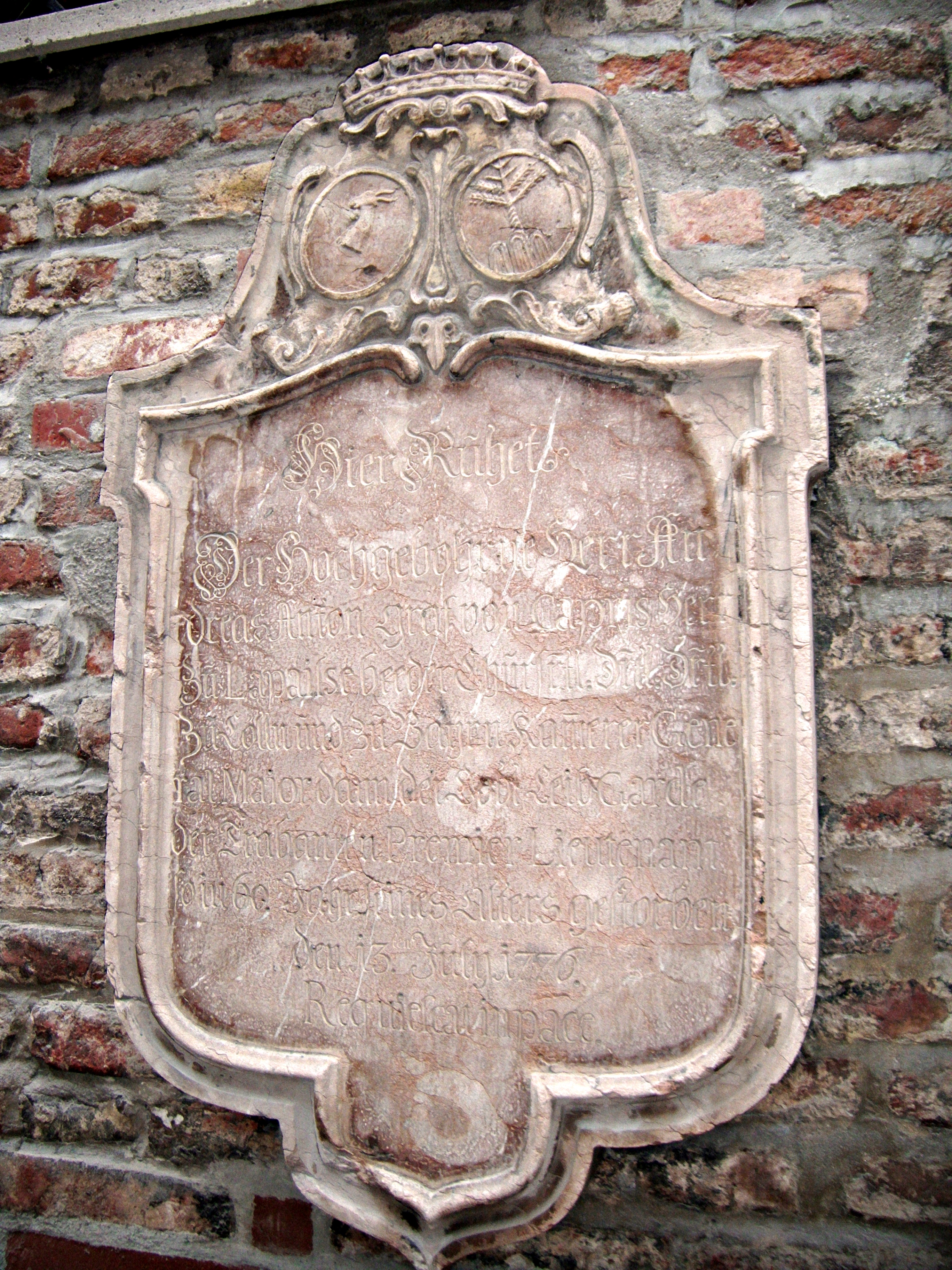 Andreas Anton Graf von Capris (1716-1776), bayerischer Generalmajor, Epitaph an der Frauenkirche München